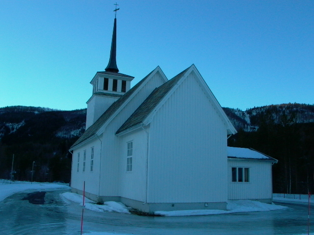 Høyforsmoen kapell i Beiarn i Nordland, om vinteren, sett fra øst.